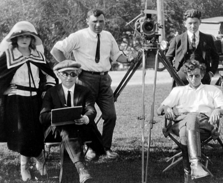 Foto del set del film The Married Flapper: a sinistra Lucille Ricksen, a destra il regista Stuart Paton